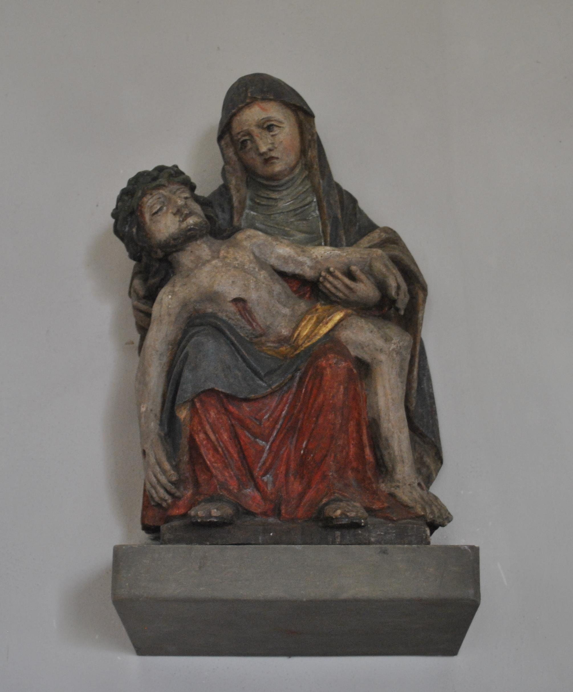 Katholische Filialkirche St. Barbara kleiner Saalbau mit polygonalem Chorabschluss und Dachreiter, bezeichnet 1771; mit Ausstattung; östlicher Anbau, 1954This is a photograph of an architectural monument.